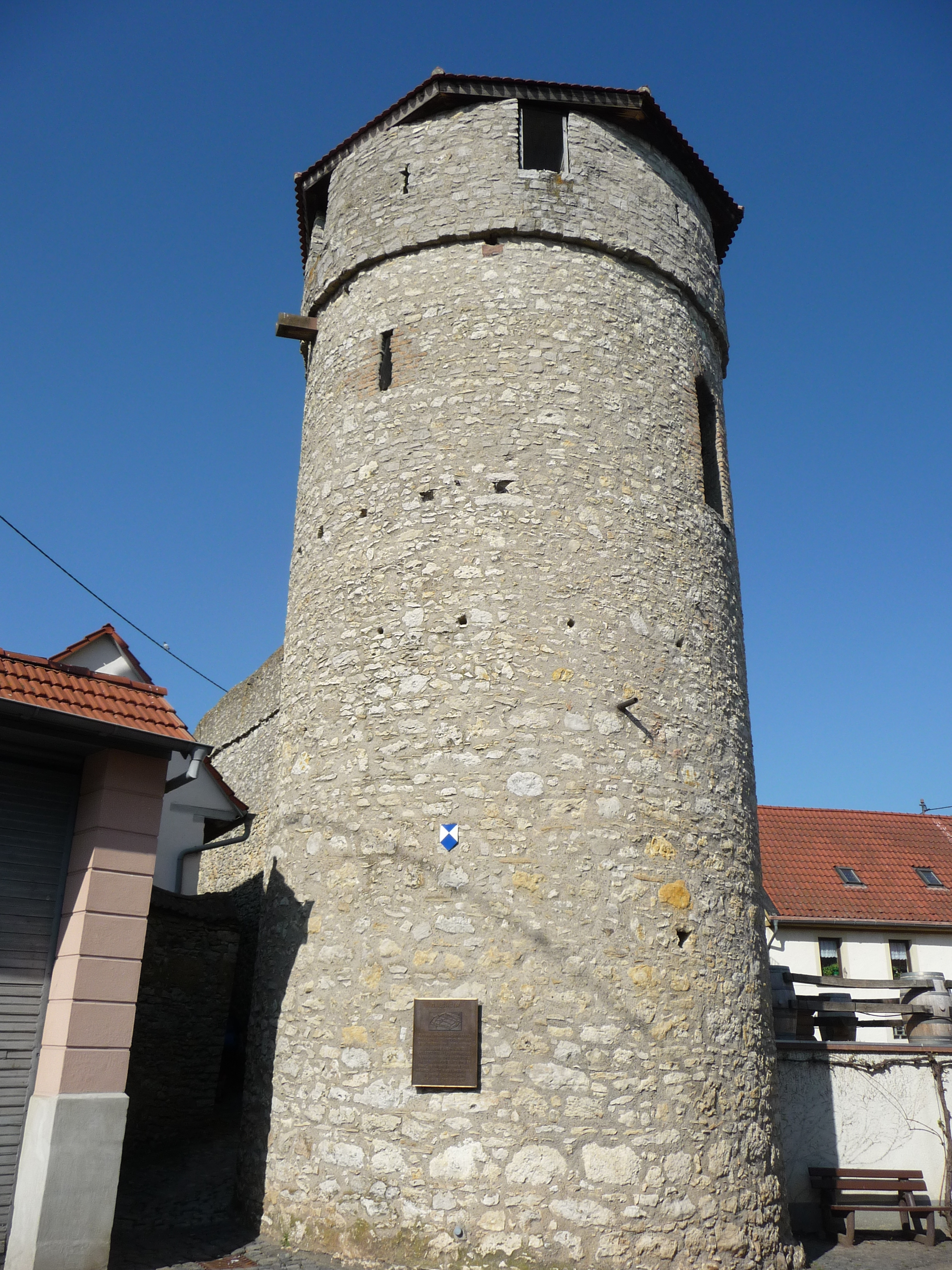 Die Fleckenmauer umschließt den Ortsteil Dalsheim. Sie wurde vermutlich zwischen 1470 und 1490 erbaut und ist heute noch fast vollständig erhalten. Ihre Länge beträgt ziemlich genau ein Kilometer.